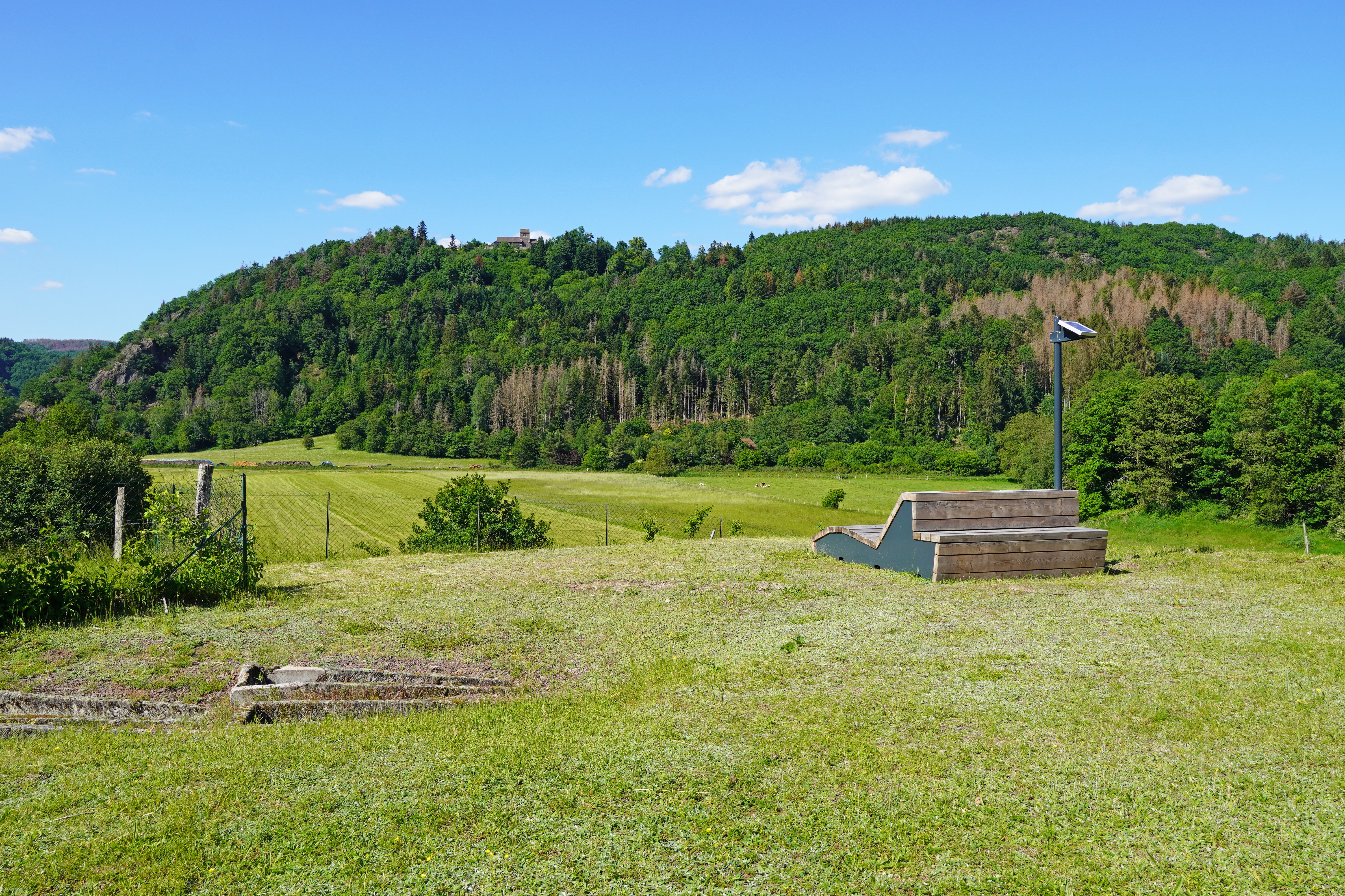 L'une de étapes équipée d'un outil interprétation interactif de « l'Échappée des 1000 Étangs », sur le site du monastère d'Annegray à La Voivre avec vue sur la chapelle Saint-Martin de Faucogney-et-la-Mer.